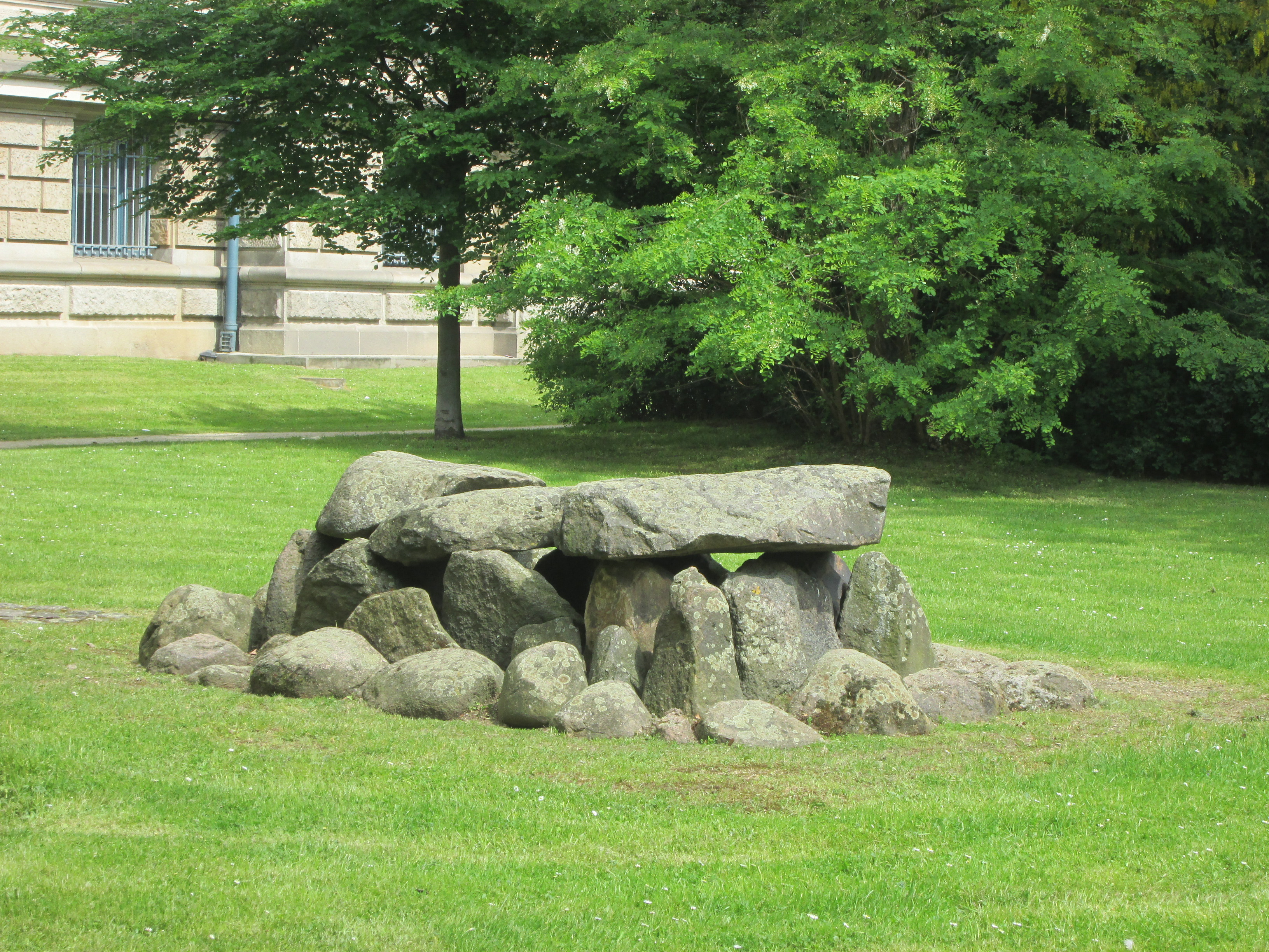 Steinkistengrab von Anderlingen (Ldkr. Rotenburg/Wümme) - Hannover-Mitte Grünfläche südlich des Landesmuseums